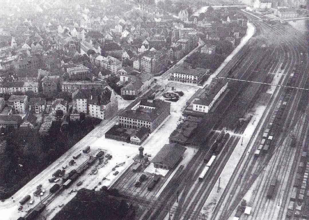 Luftansicht des Ulmer Bahnhofs im Jahr 1905, von links nach rechts: Ulmer Innenstadt, Bahnhofplatz mit Hotel "Zum Russischen Hof" und Bahnhofspost, südlich davon der Postbahnhof, Empfangsgebäude und Güterabfertigung, Bahnsteige, Abstellbahnhof